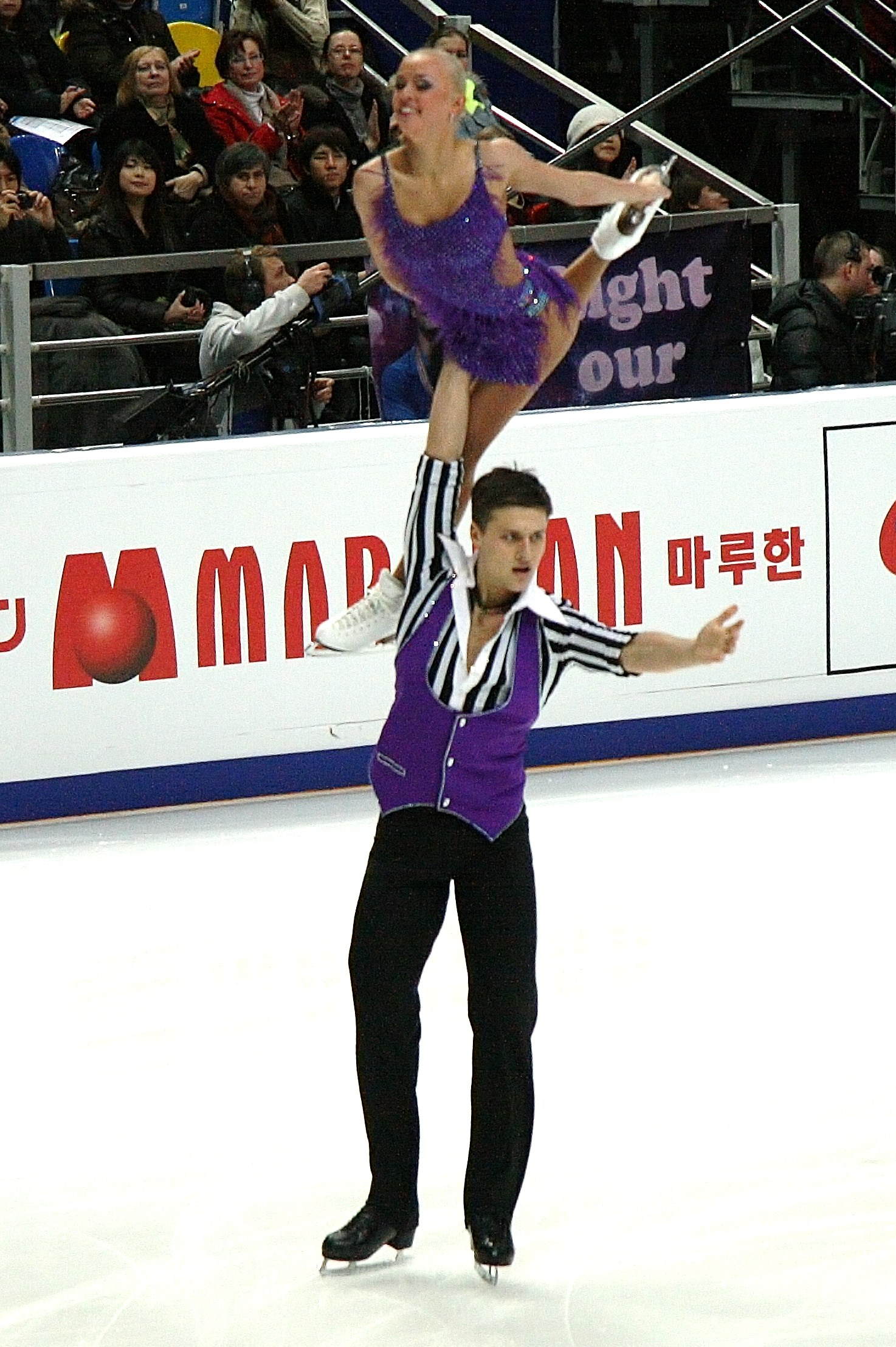 Катарина Гербольдт и Александр Энберт на Кубке Ростелекома 2011. Короткая программа. Поддержка.